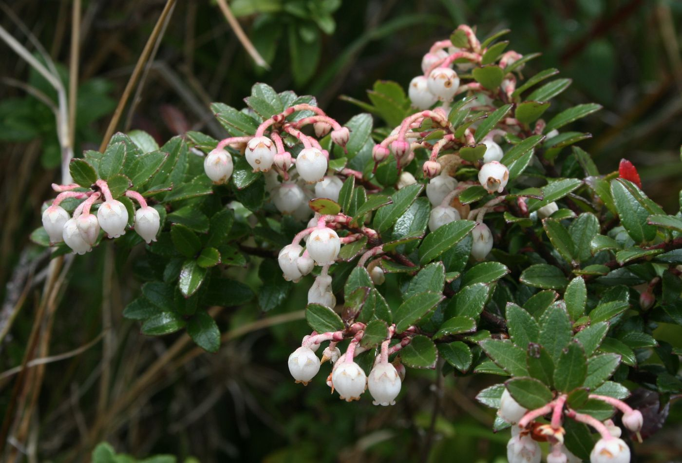 Gaultheria myrsinoides (= Pernettya prostrata), Heidekrautgewächse (Ericaceae) - Costa Rica: Prov. Alajuela, Parque Nacional Volcán Poás, 2550-2600 m